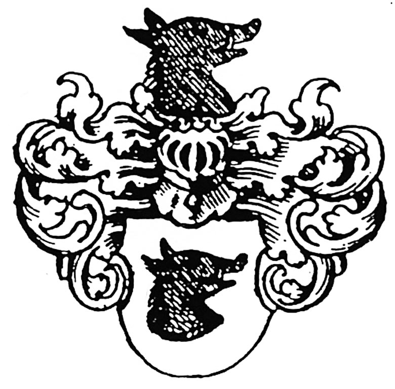 Wappen der Anhaltinischen Adelsfamilie Qualen